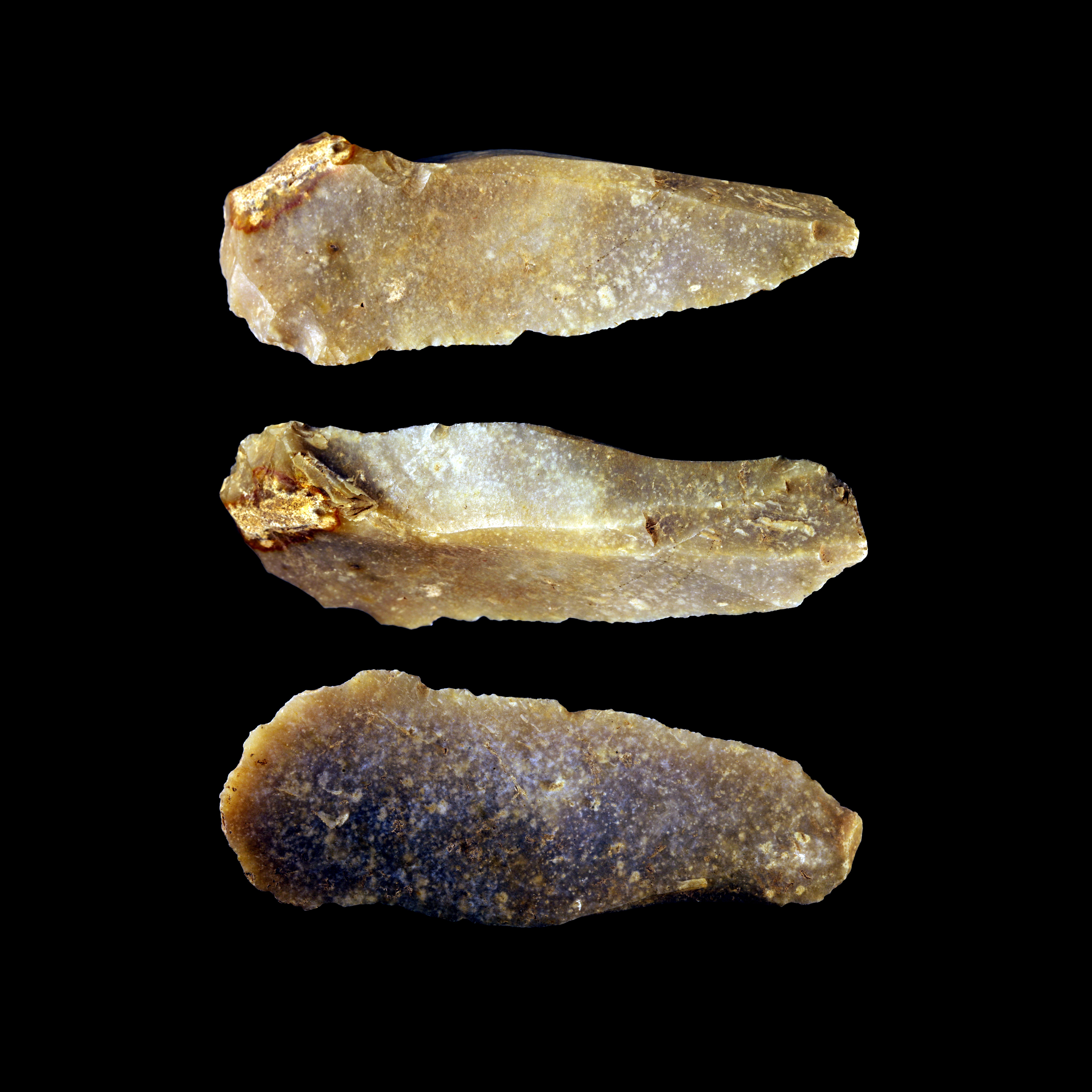 Silex blade 115